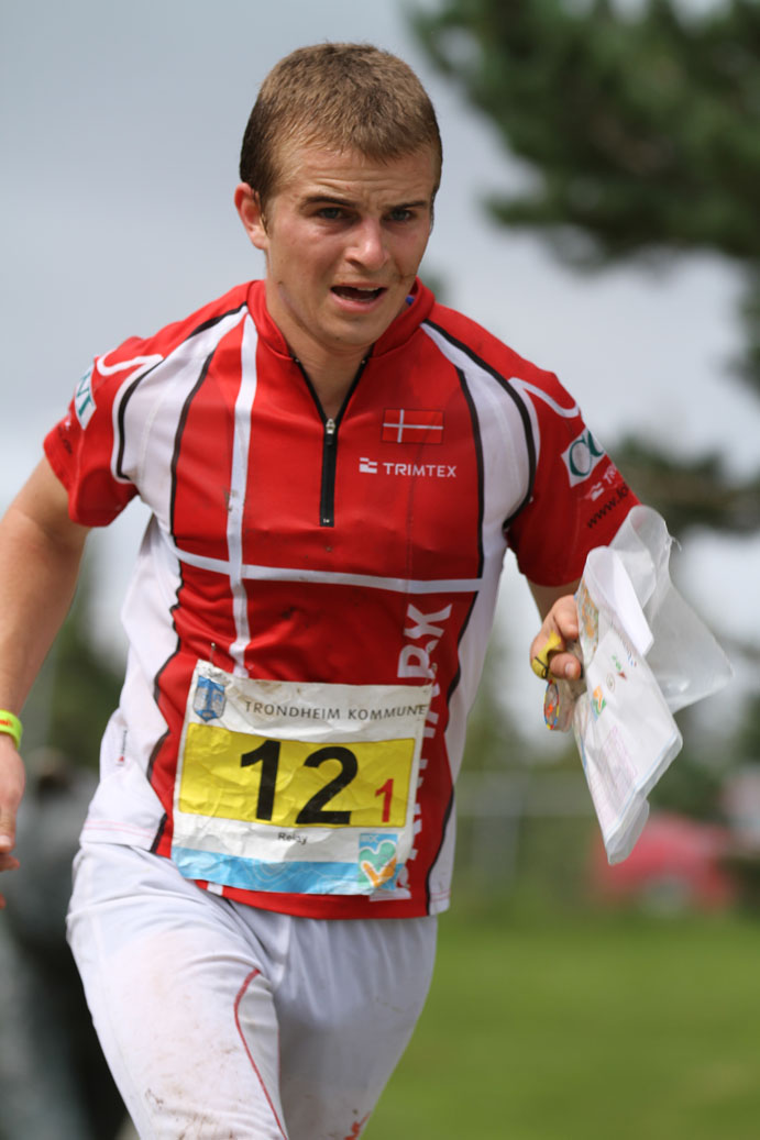 Relay at WOC2010